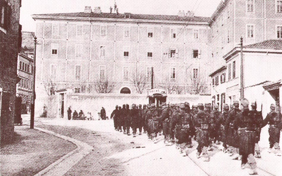 Kasárna c.k. pěšího pluku v Terstu, okolo roku 1900